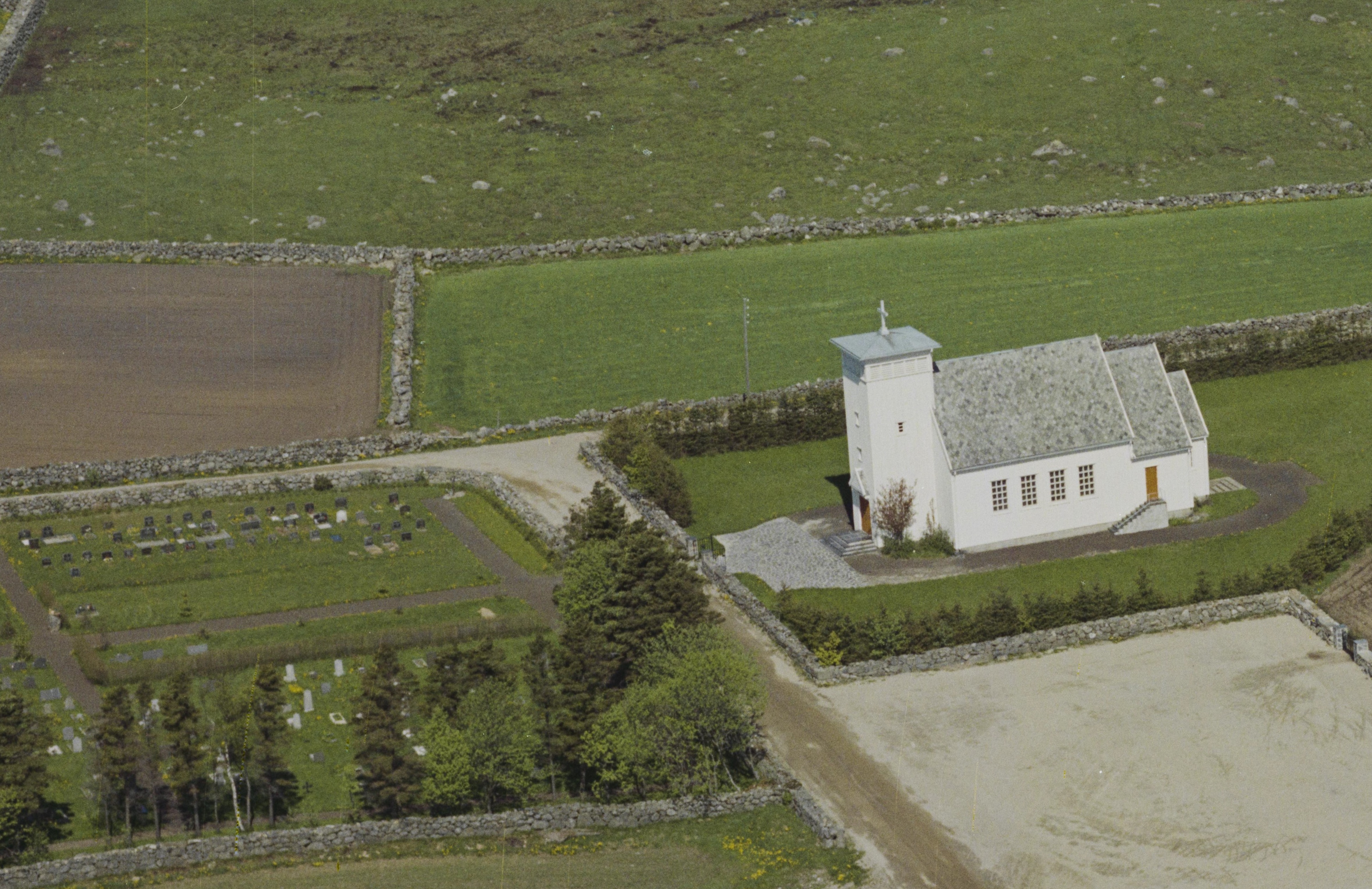 Ræge kapell fra 1940, revet 2010. Foto: Widerøes Flyveselskap (1962), fra Nasjonalbibliotekets samling